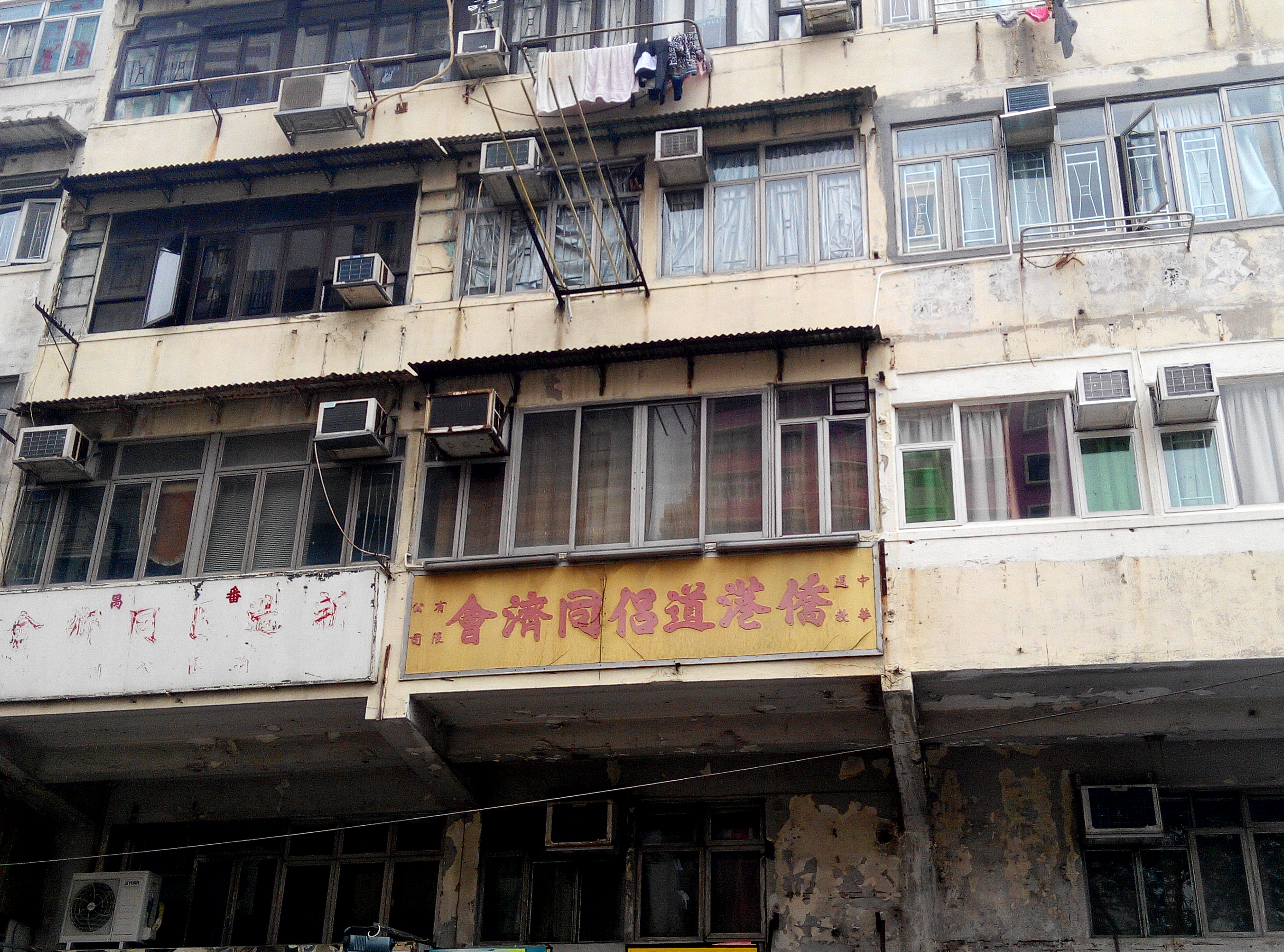 於1946年由20間從廣州遷港的正一道院組成的「中華道教僑港道侶同濟會」